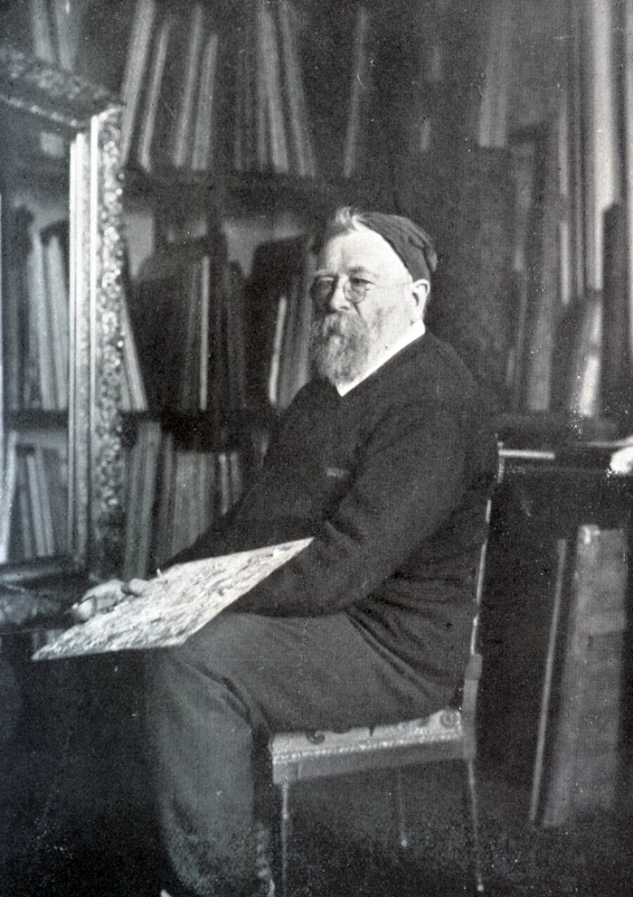 Portrait photograph of Albert Lebourg, Extrait de, Exposition Albert Lebourg au profit des sinistrés du Japon, 1923